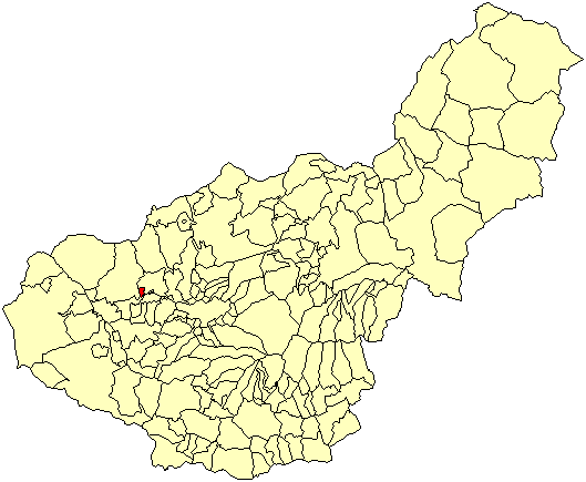 Situación del término municipal de Valderrubio respecto a la provincia de Granada, en España.